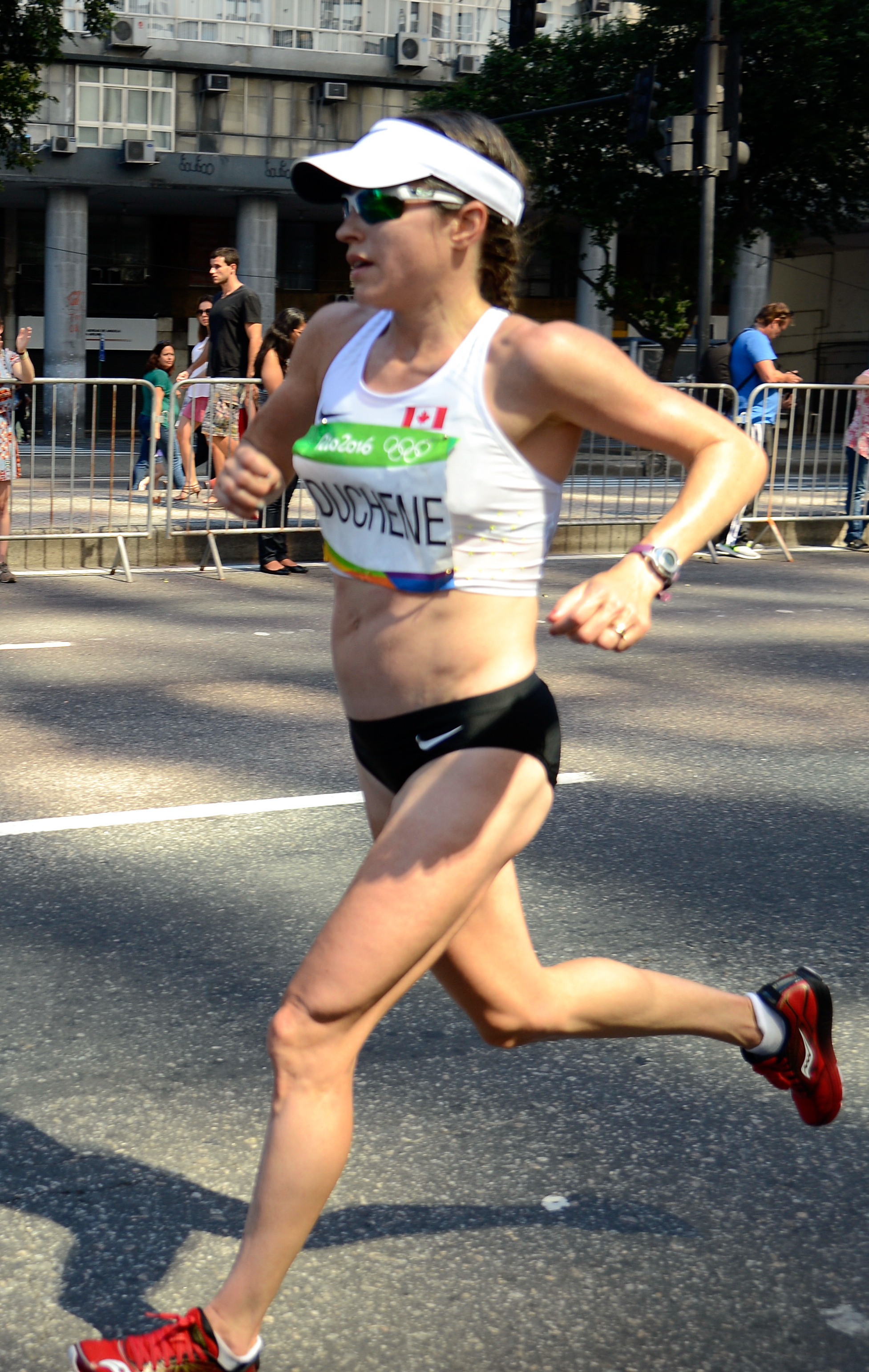 Rio de Janeiro - A Maratona Feminina Olímpica, que passa pelas ruas da cidade, e o Boulevard Olímpico lotam a região central da cidade neste domingo. (Tânia Rêgo/Agência Brasil).